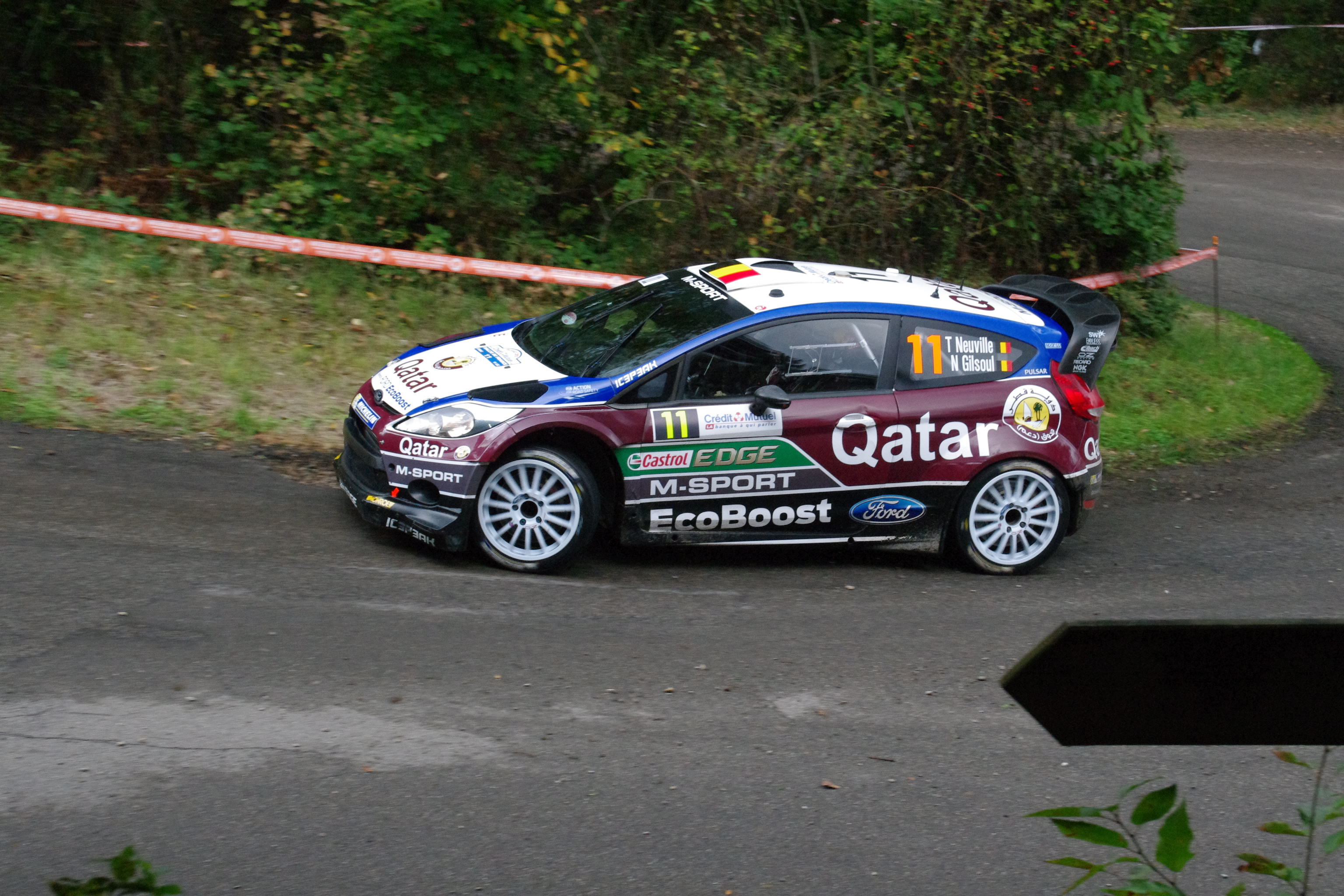 Rallye De France Alsace